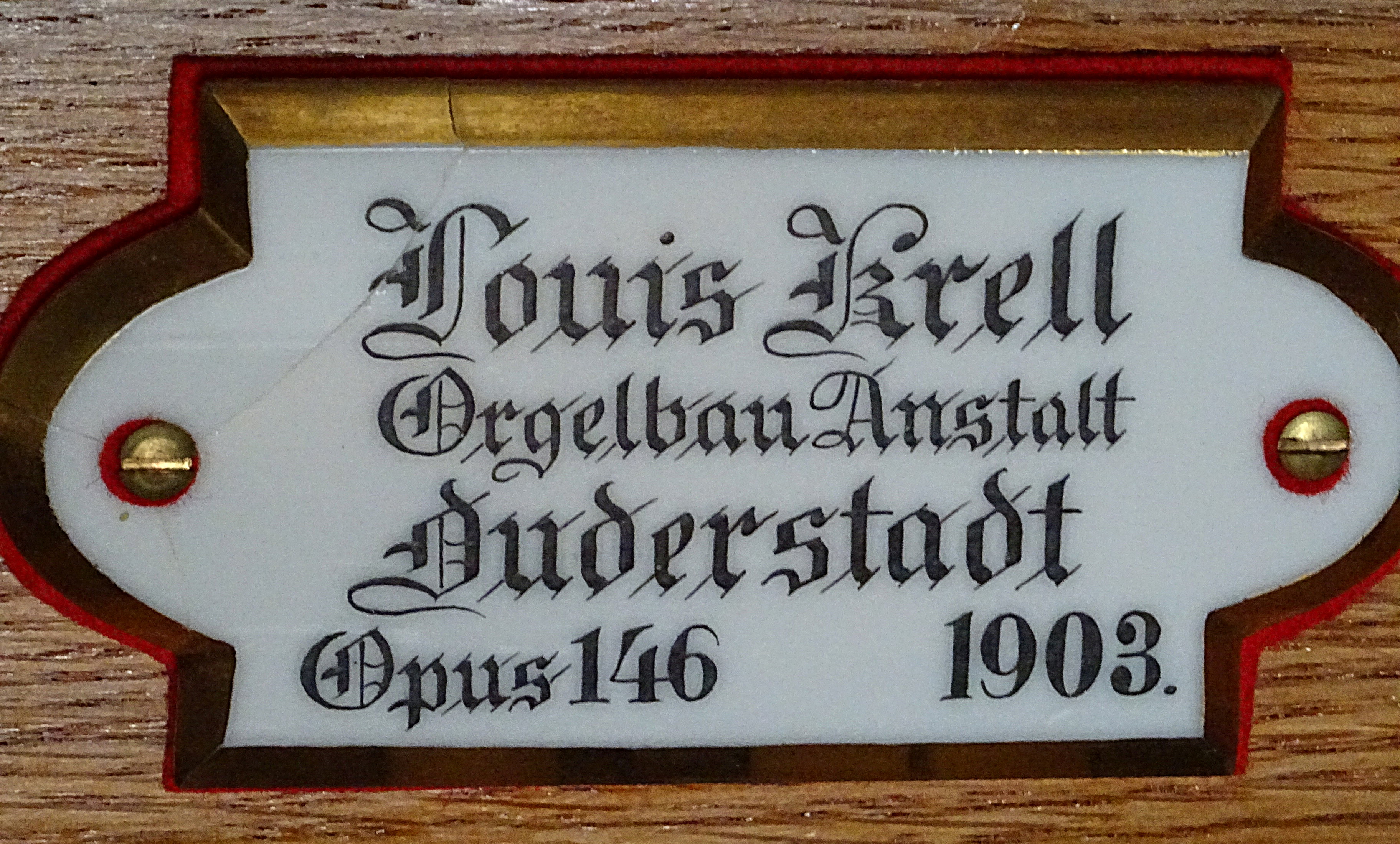 Firmenplakette am Orgel-Spieltisch von Louis Krell (1903 IIP/18) in der Dorfkirche St. Georg (Günterode)